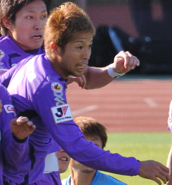 Koji Morisaki head, cropped from DSC_7694